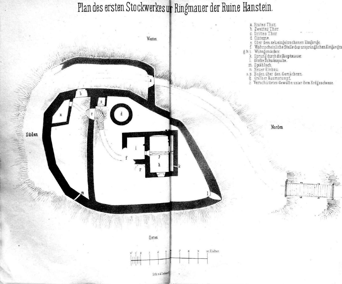 Grundriss der Burg Hauenstein bei Gallmannsegg